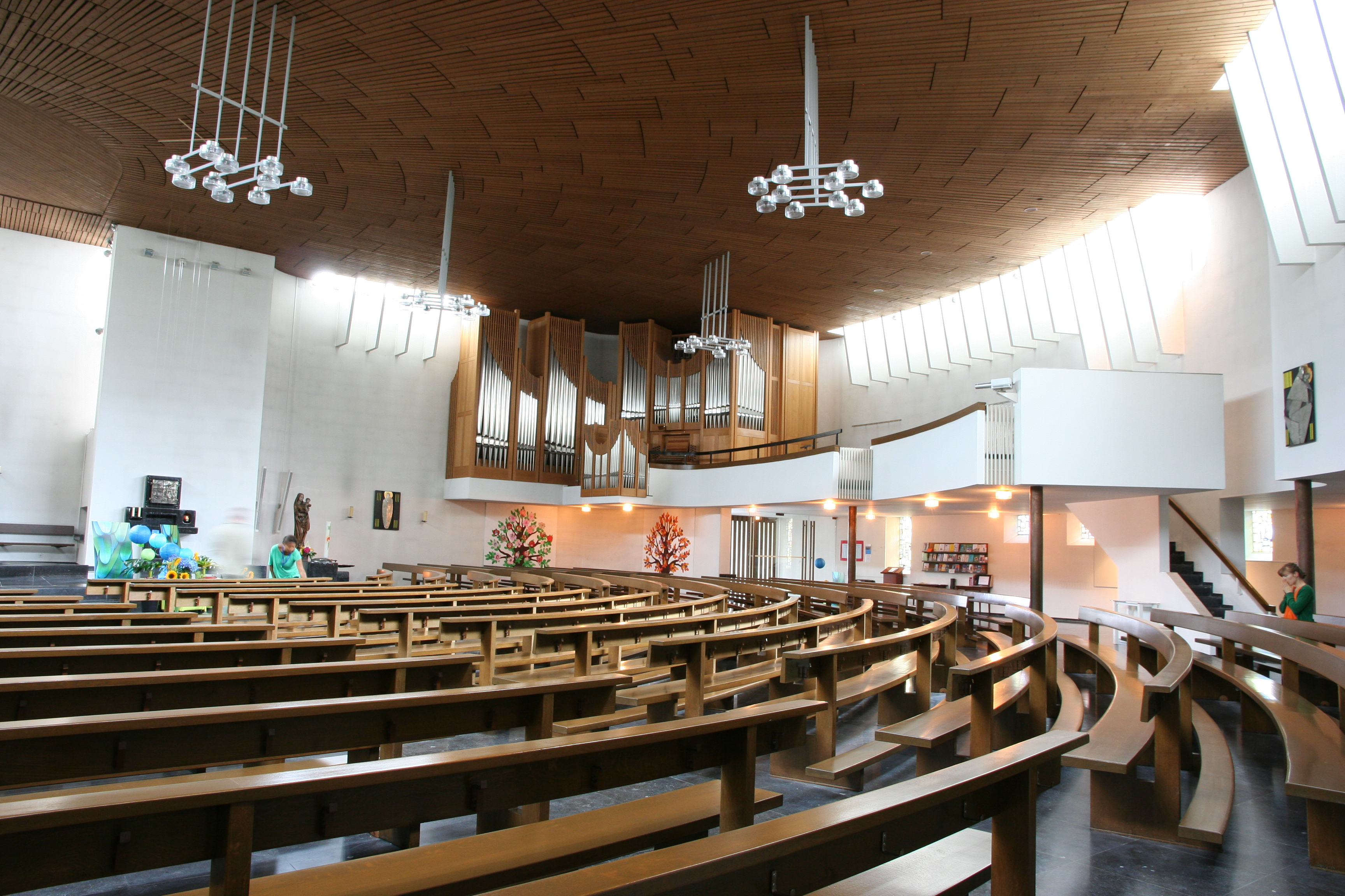 Römisch-katholische Kirche St. Meinrad Pfäffikon SZ, Innenansicht